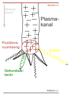 Joonisel on kujutatud striimeri tekkemehhanismi koos striimeri põhikomponentide nimedega.